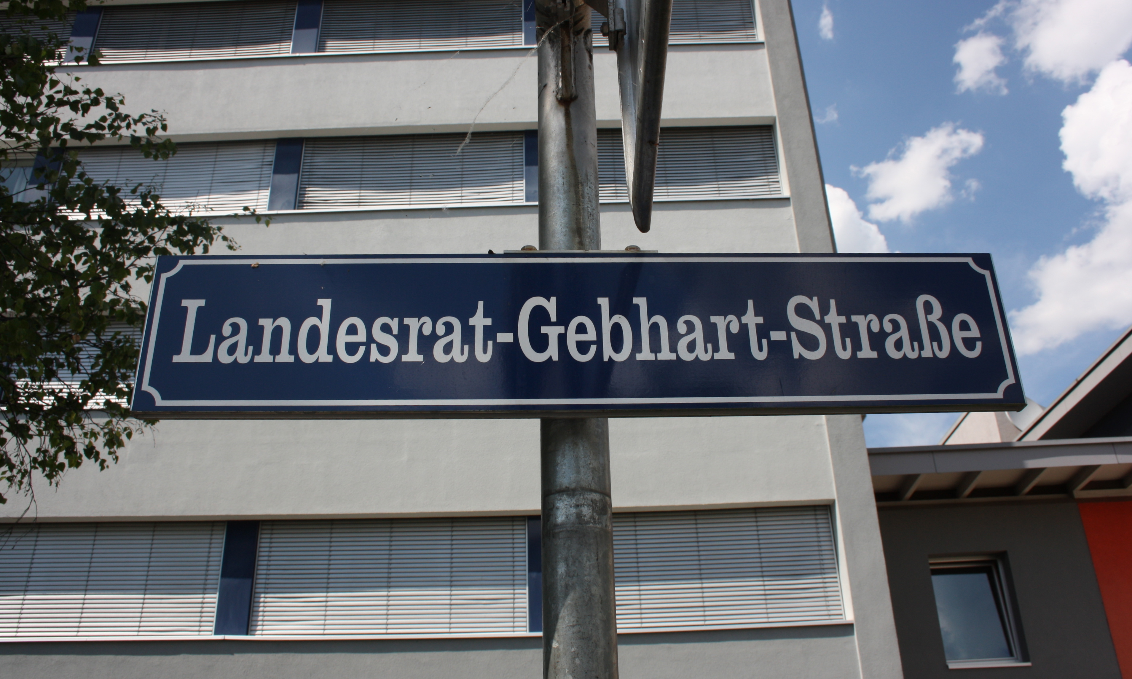 Straßenschild der Landesrat-Gebhart-Straße in Imst.